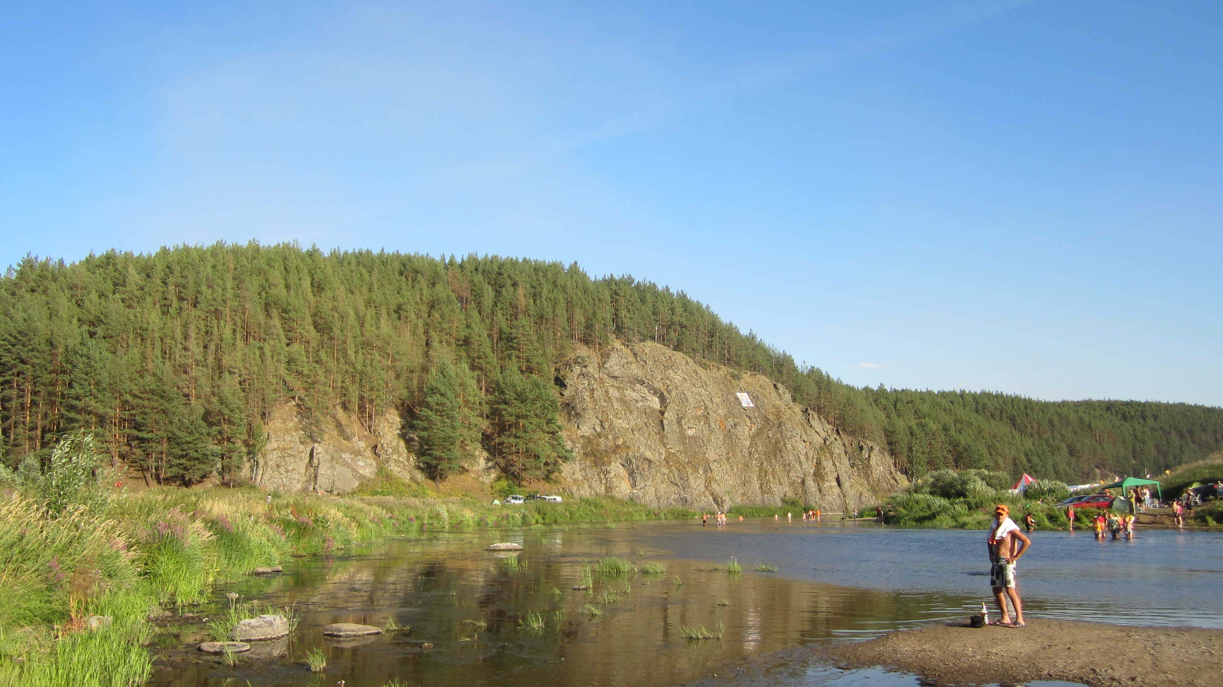 Фестиваль "Знаменка" рядом с с.Знаменское, Сухоложский район, Свердловская область, 2012г.